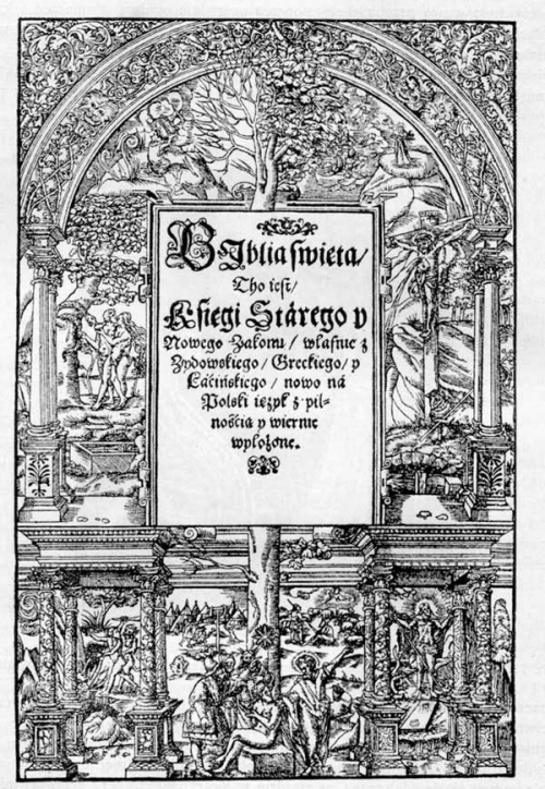 Biblia Brzeska